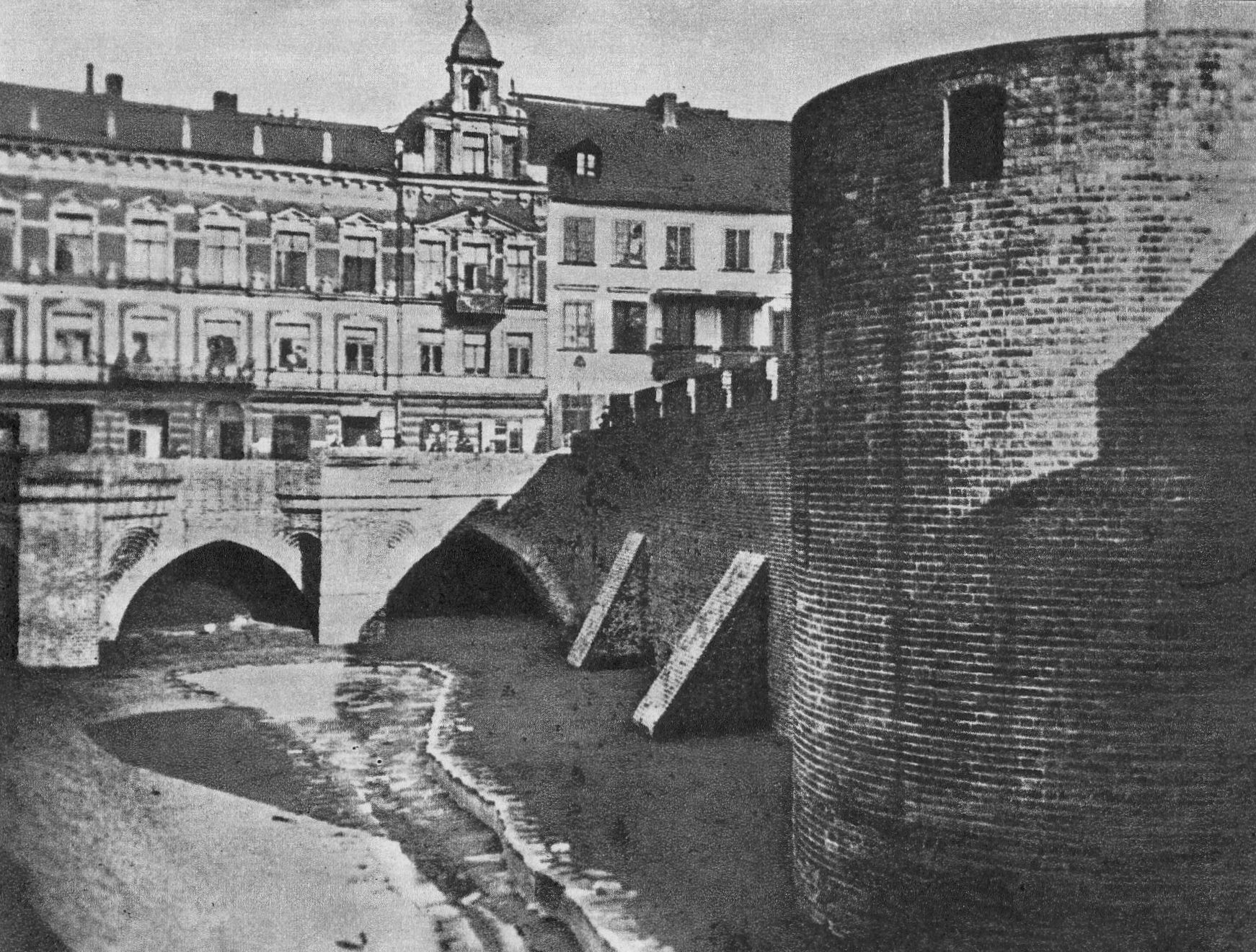 Piwnica Gdańska, ul. Nowomiejska 18/20 oraz mury Starego Miasta w Warszawie.